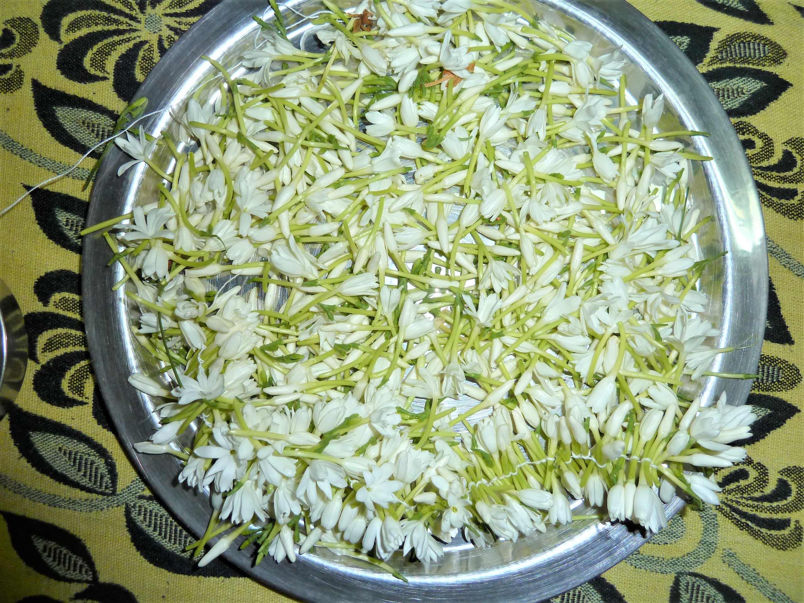 సన్నజాజులు